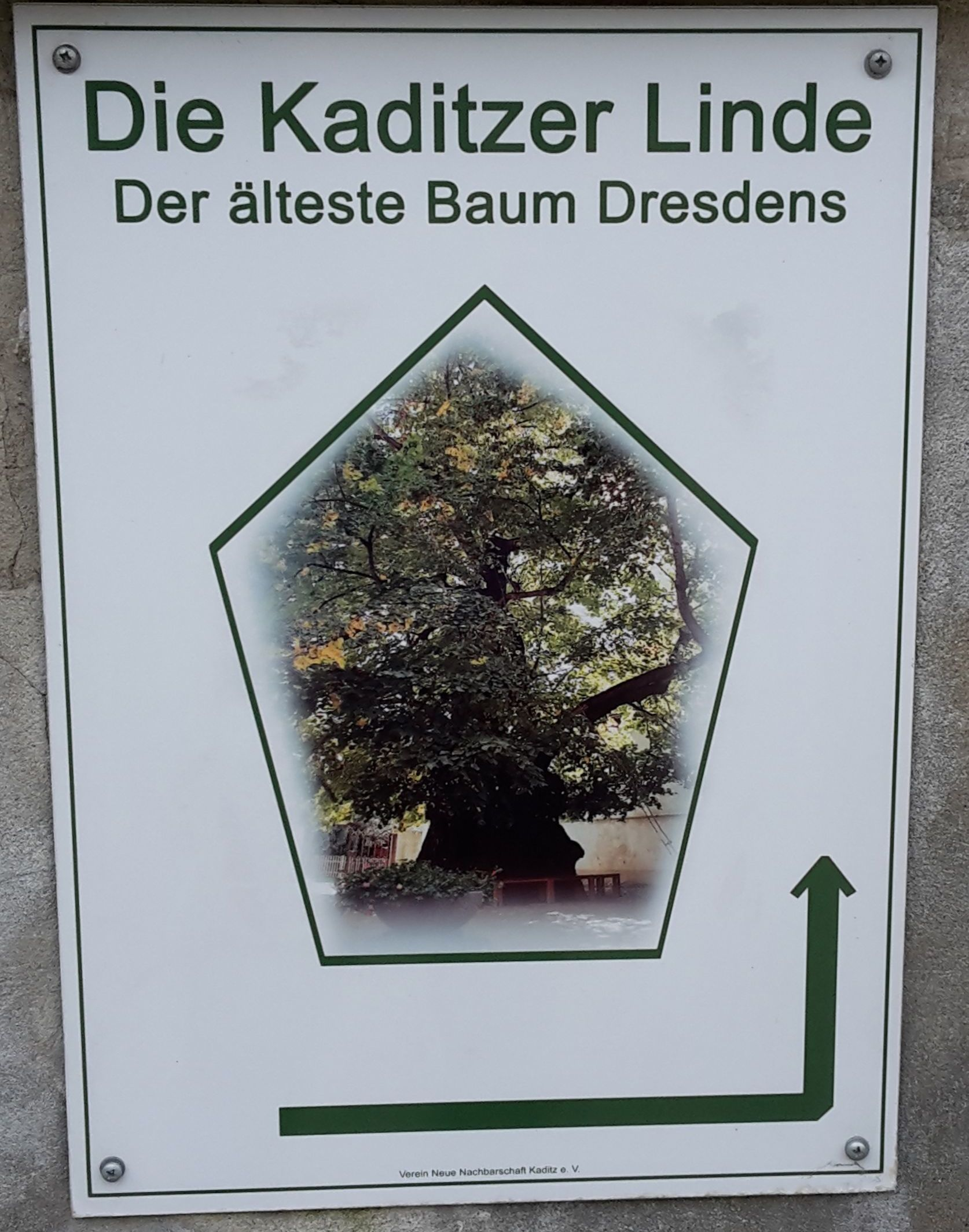 Wegweiswer zur Kaditzer Linde